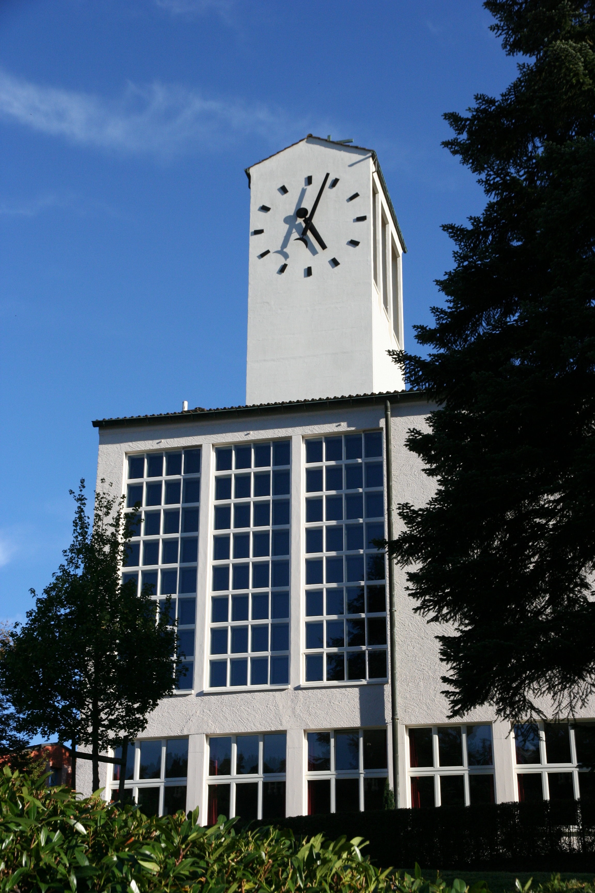 Römisch-katholische Pfarrkirche St. Gallus Oberuzwil